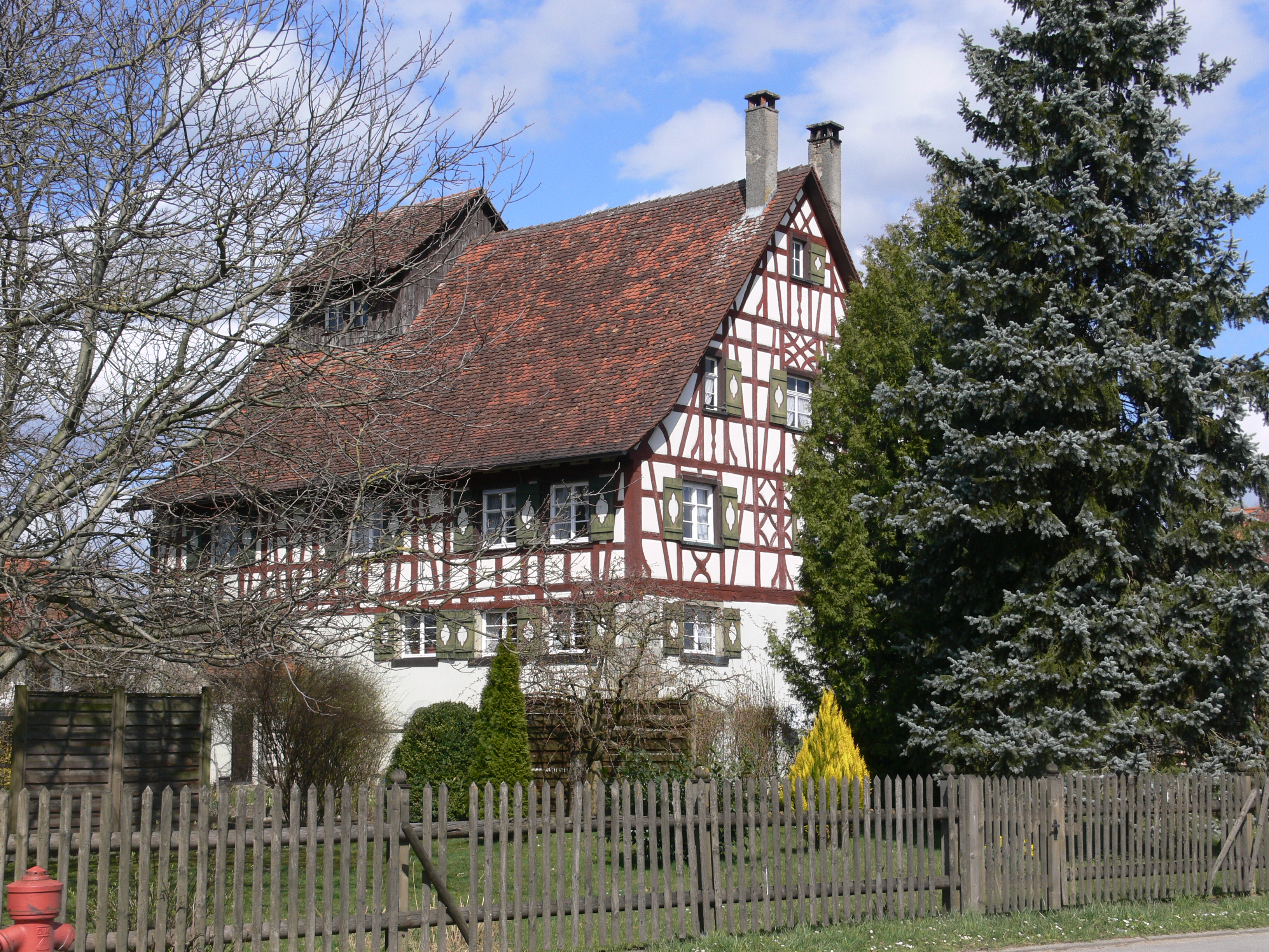 Ahausen, Gemeinde Bermatingen, Bodenseekreis Obere Mühle